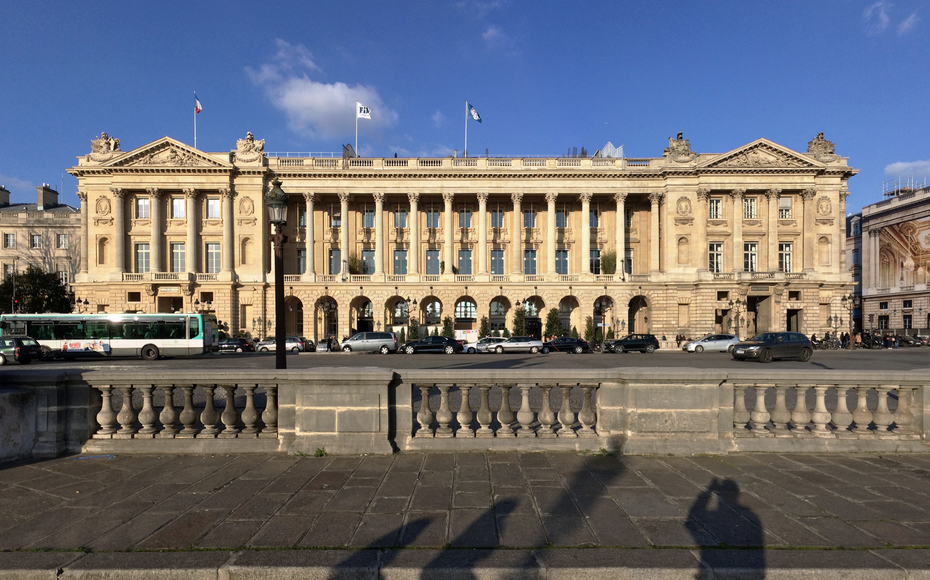 Place de la Concorde, Rue Royale, Avenue des Champs-Élysées, 8e arrondissement, Paris, Fassadenplanung 1757–1758 Ange-Jacques Gabriel, Gebäudeplanung 1758 und Umbau 1775 Louis François Trouard, Umbau 1907–1909 Hippolyte Destailleur